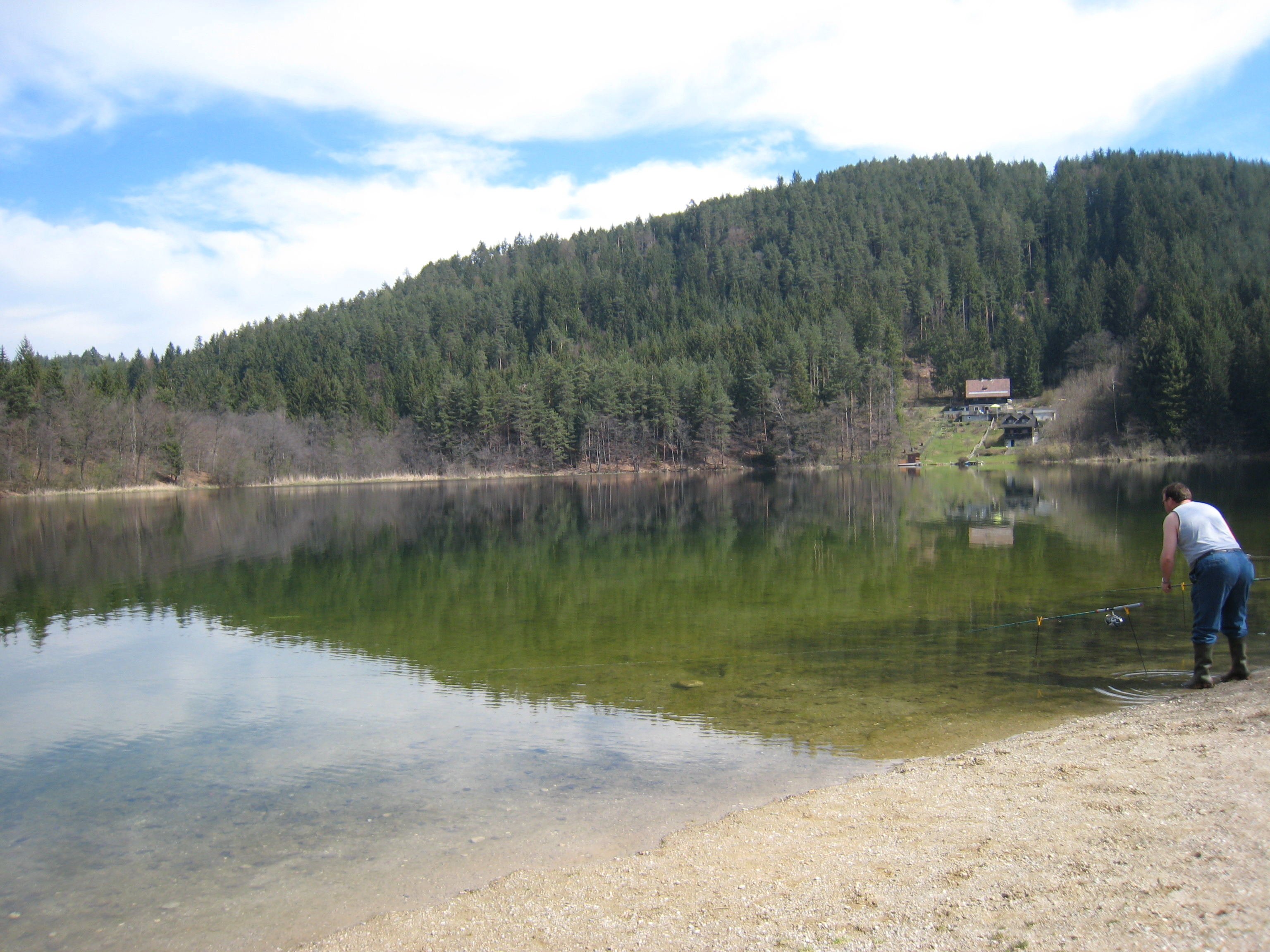 Vassacher See